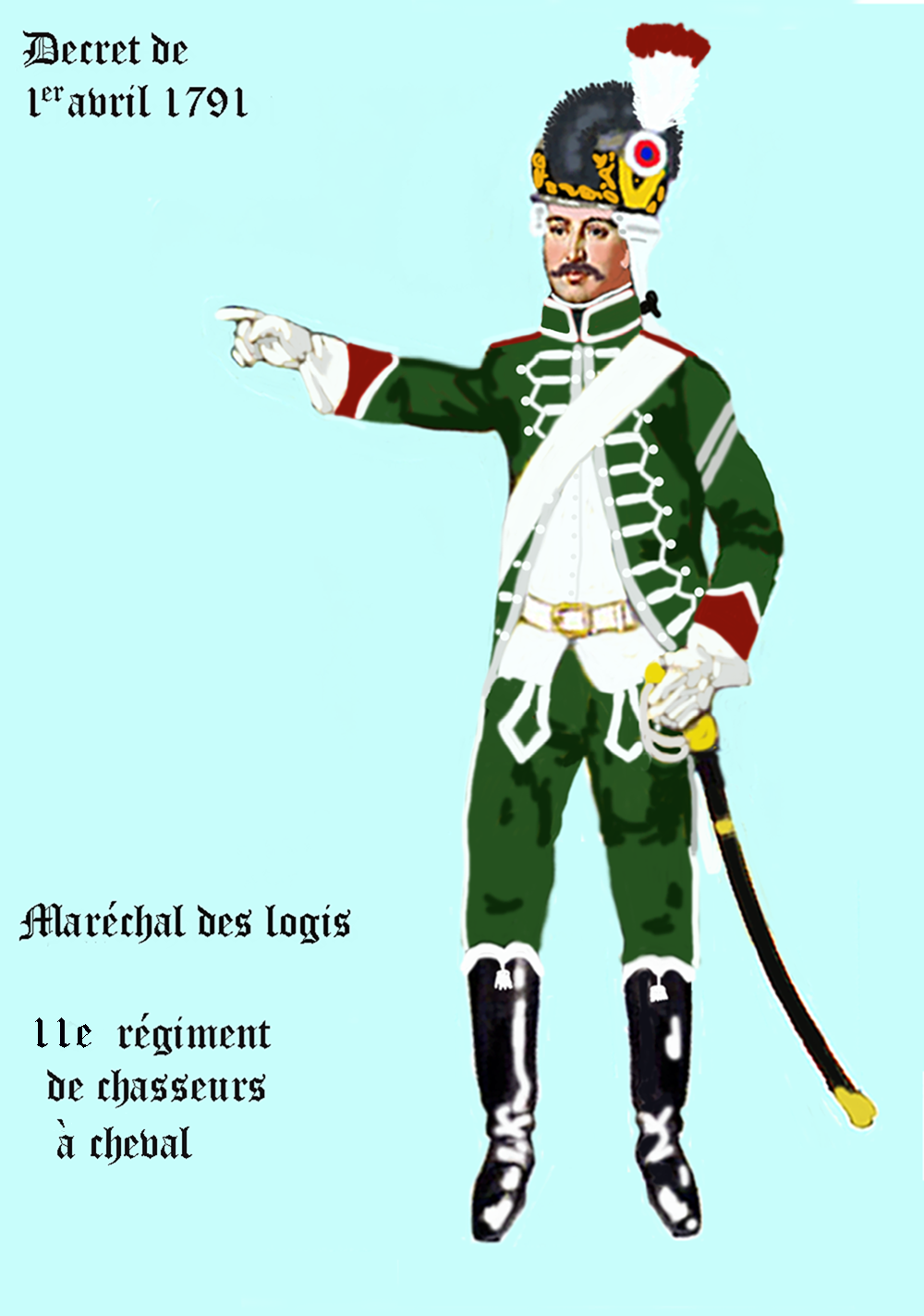 l'uniforme du 11e régiment Chasseurs à cheval de 1791